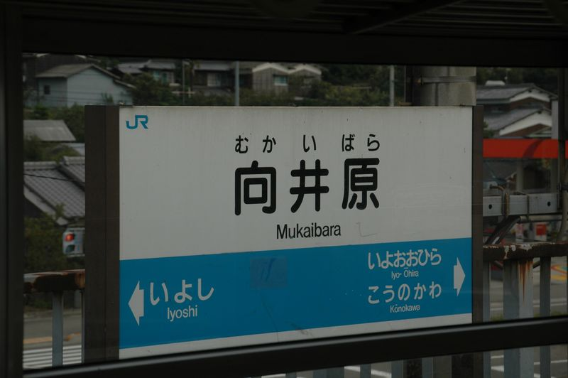 JR-Shikoku(JAPAN) Yosan Line , Mukaibara Sta. Station name sign. photo by 2005.9.19